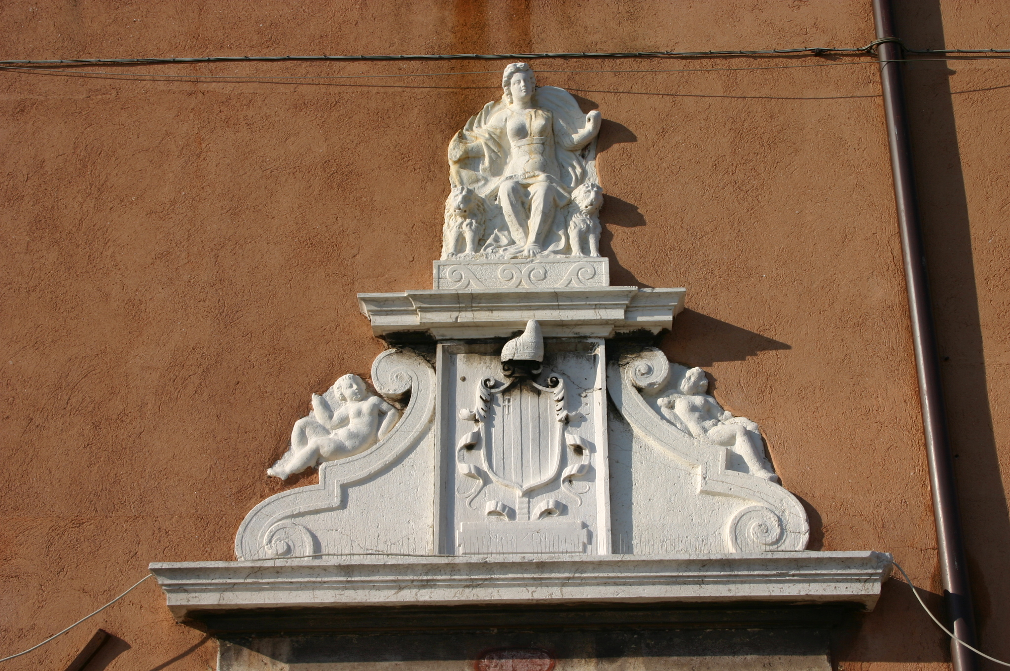 Portale con lo stemma del doge Marino Grimani del Deposito del Pane, sulla Riva degli Schiavoni a Venezia. L'edificio fu costruito nel 1596 come deposito di viveri per la flotta della Repubblica di Venezia. Foto di Giovanni Dall'Orto, 3 agosto 2007.